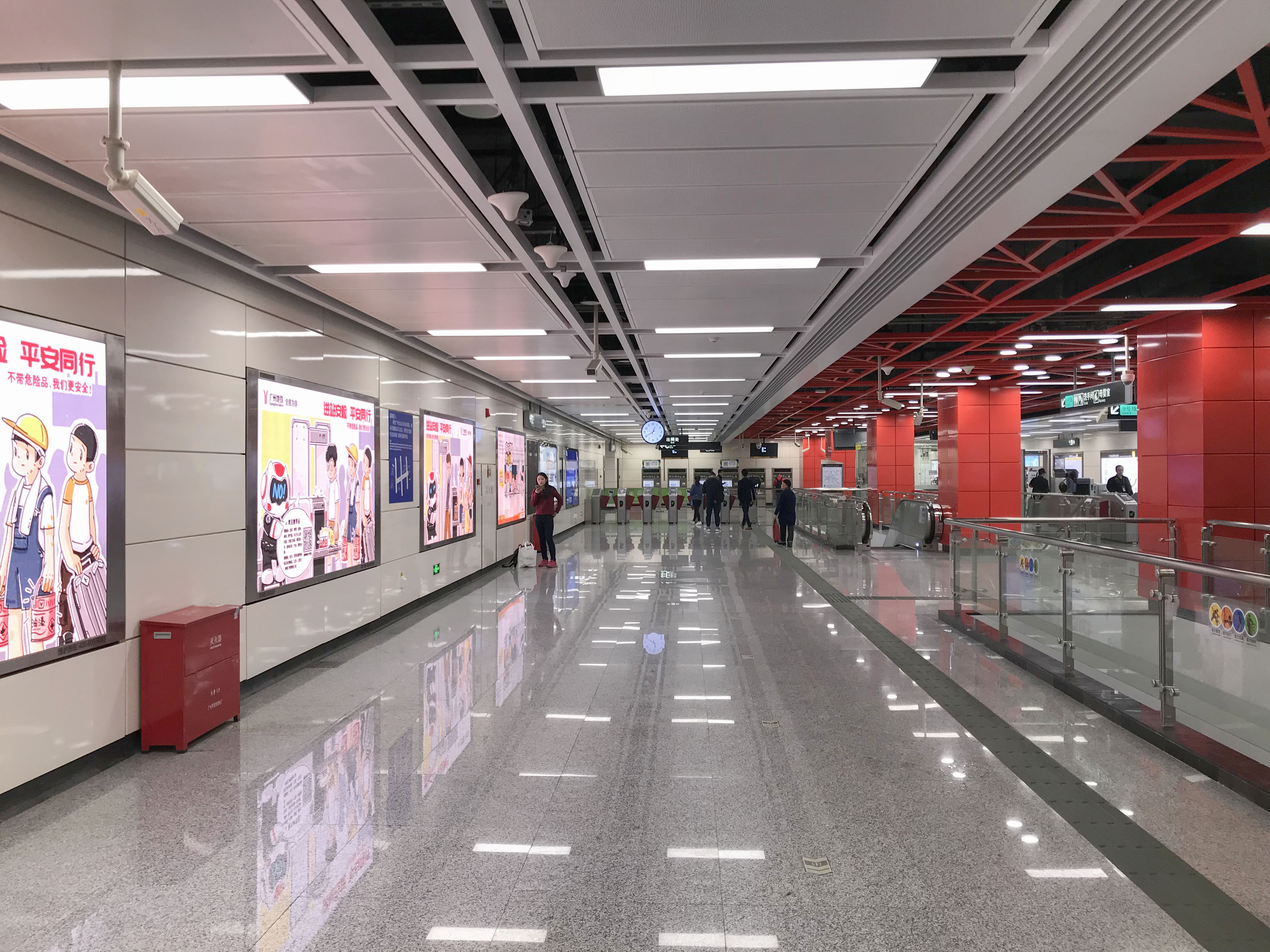 广州地铁花城路站